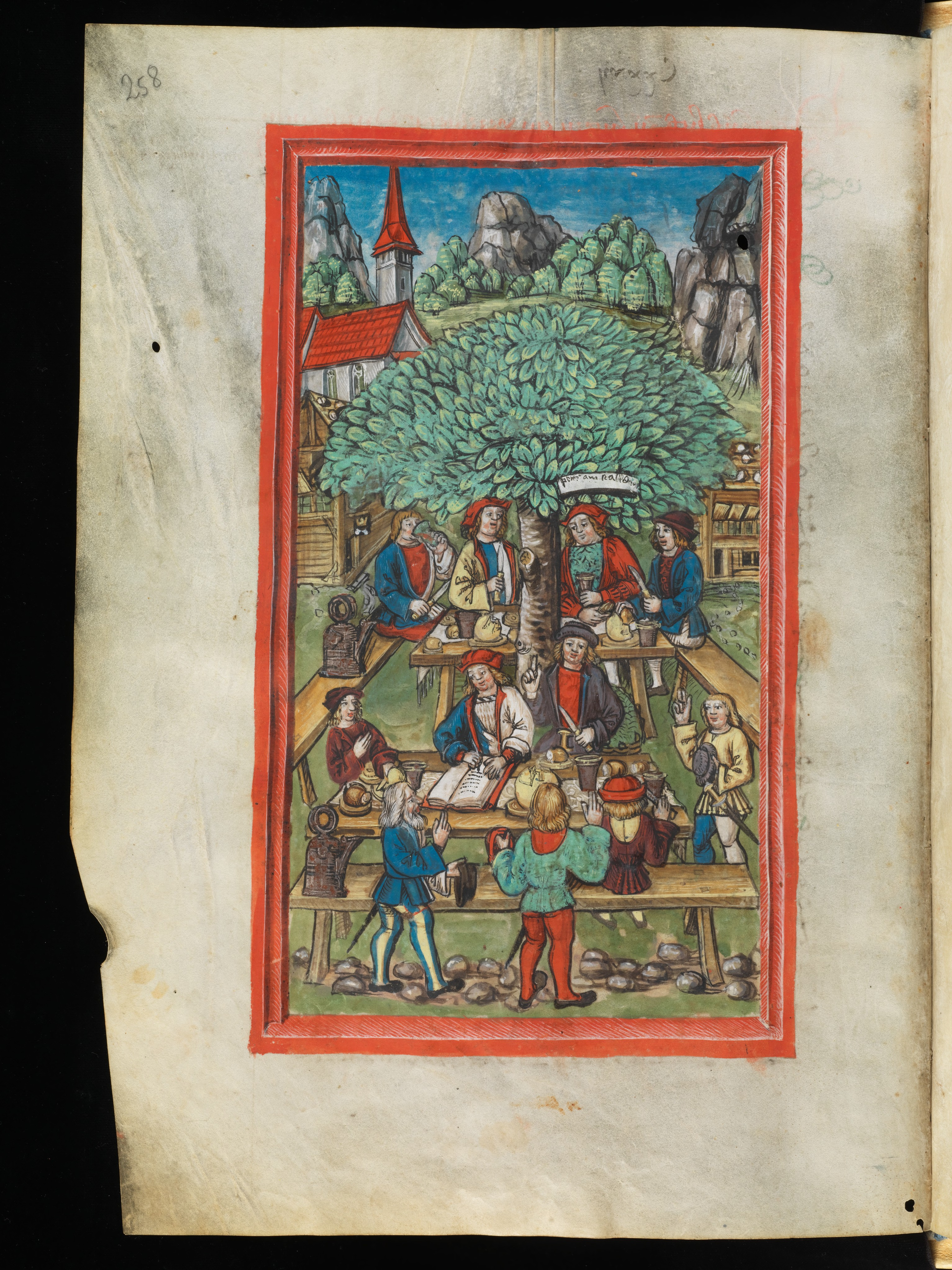 Amstaldenhandel: Unter der Dorflinde von Schüpfheim tafelt Peter Amstalden, Landeshauptmann und Gastwirt, mit seinen Gesellen und erzählt von seinen aufrührerischen Plänen gegen die Stadt Luzern. Im Vordergrund notiert der städtische Beamte die Aussagen einiger Kundschafter (1478) Luzern, Korporation Luzern (depositum at the Zentral- und Hochschulbibliothek Luzern, S 23 fol., fol. 127v [S. 258]).